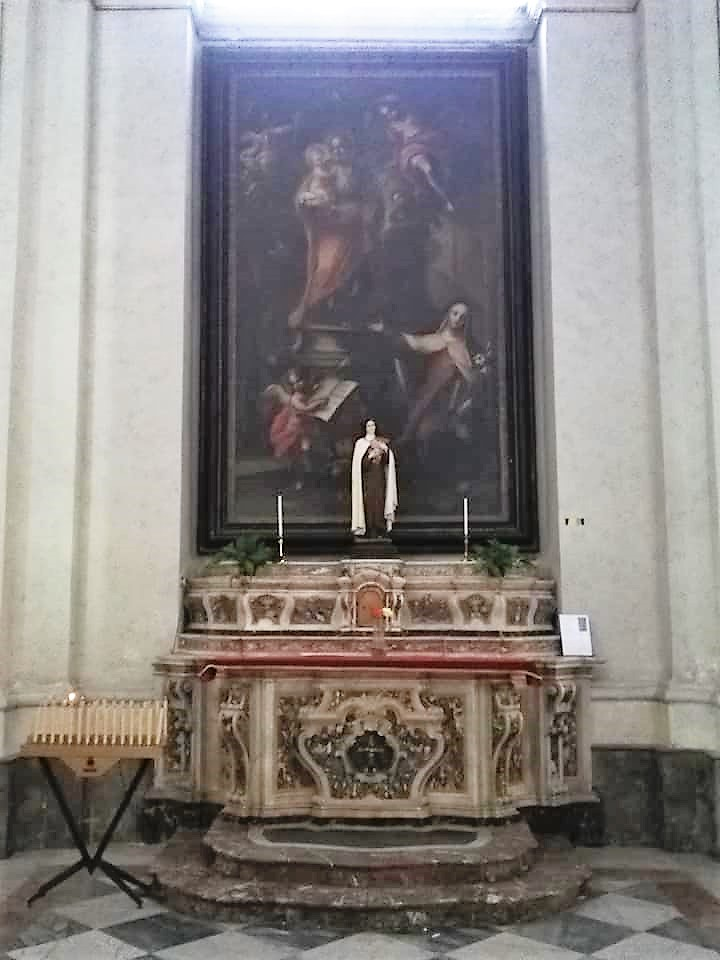 Altare di San Giuseppe. Dipinto raffigurante San Giuseppe pregato da Santa Teresa di Gesù del 1782, opera di Francesco Gramignani.